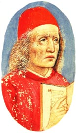 Effigie di Marsilio Ficino